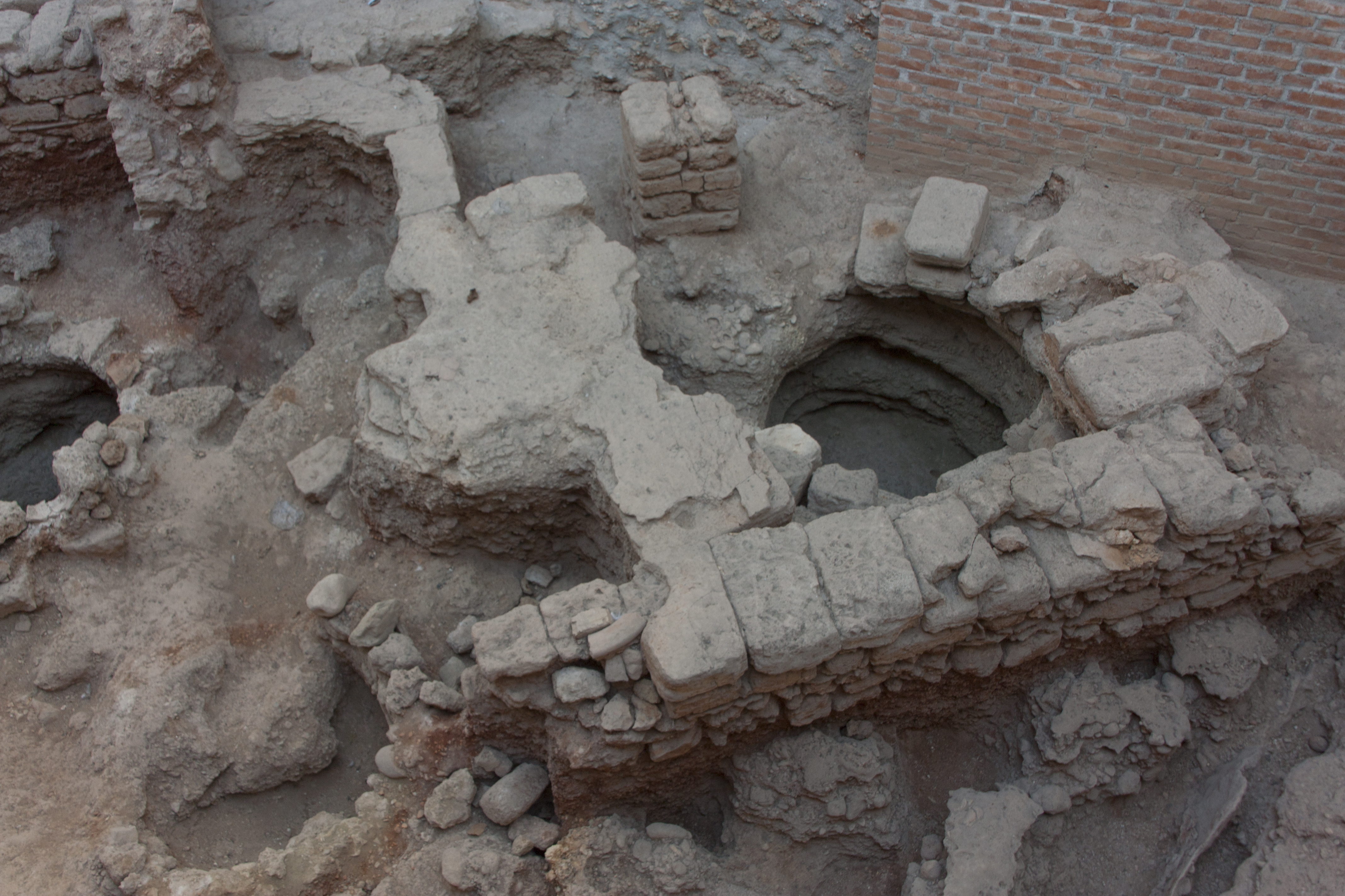 Opificio arabo di Palazzo Steri